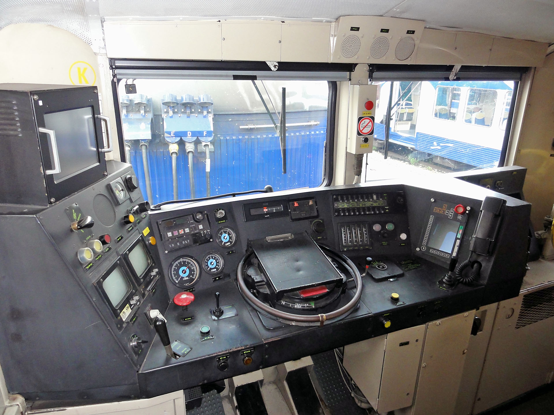 Pupitre de conduite d'une locomotive BB 17000 au technicentre Paris Nord-Joncherolles, Villetaneuse, Seine-Saint-Denis, France.